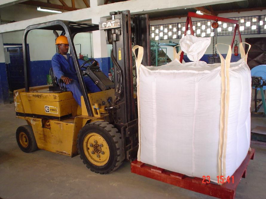 Big Bag ou Bulk Bag